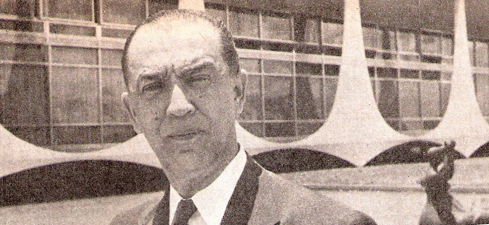 Juscelino Kubitschek, político brasileño